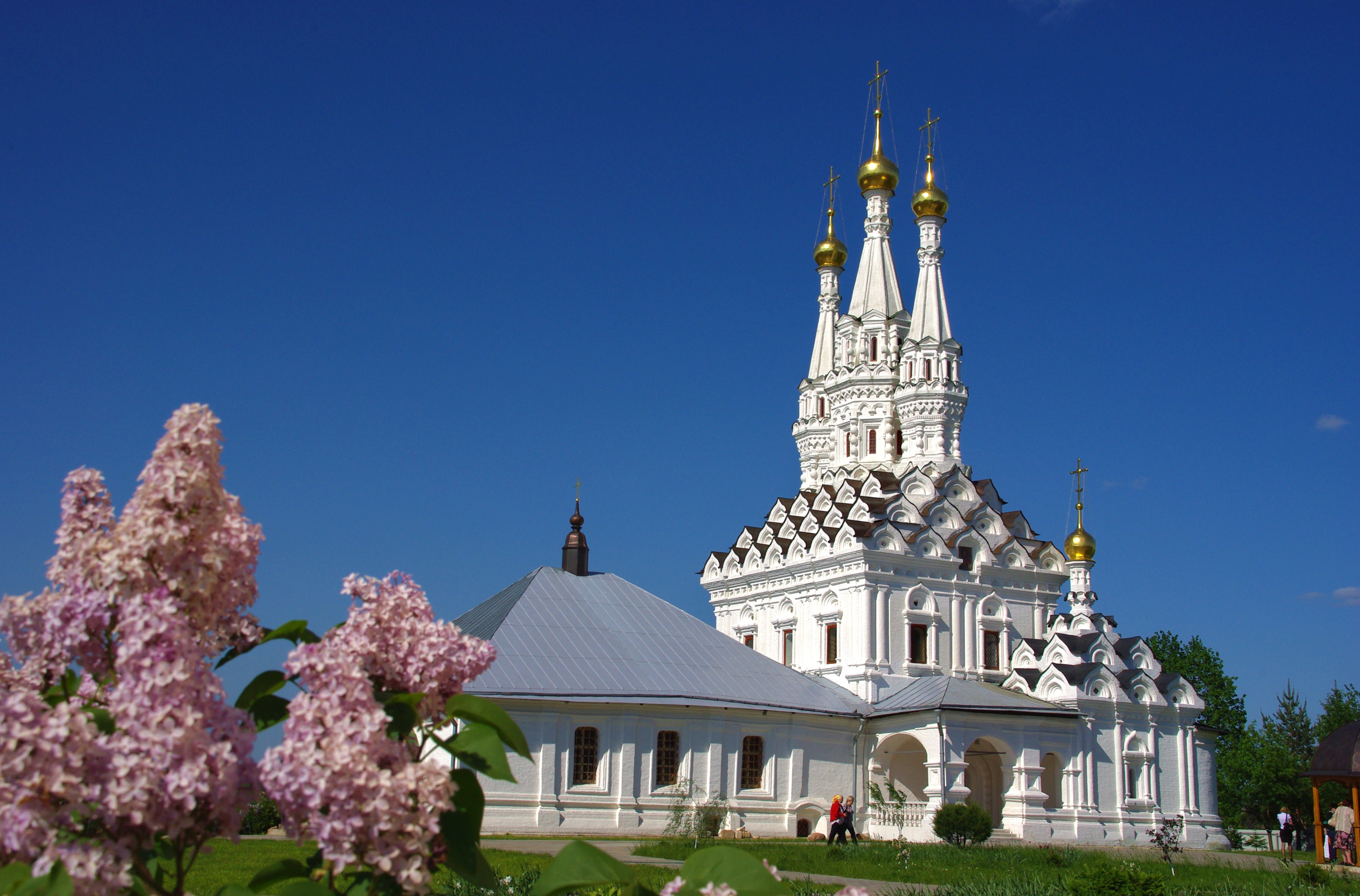 Церковь Одигитрии (Одигитриевская церковь Ивановского монастыря) (Смоленская область, Вязьма, город Вязьма, Гражданской войны улица)